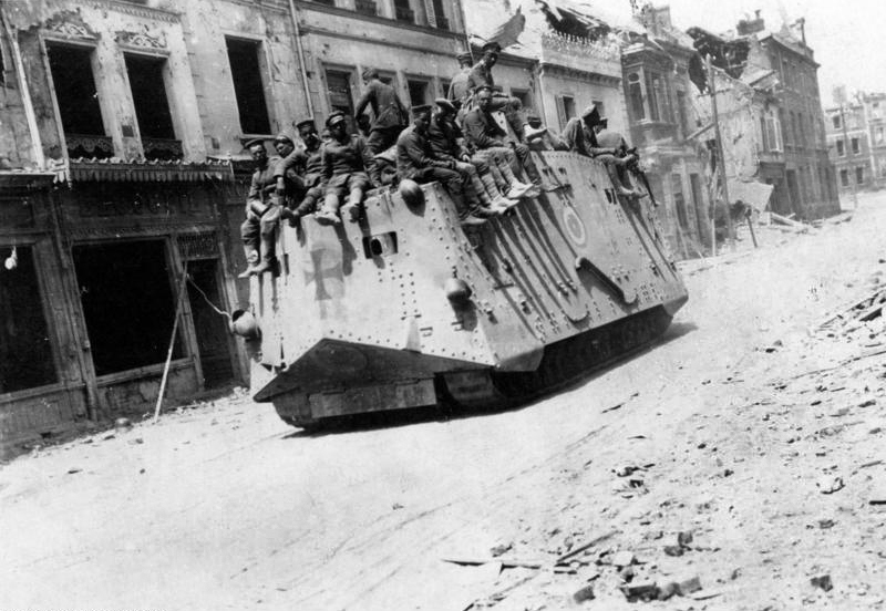 Westfront, deutscher Panzer in Roye Deutscher Sturmwagen in Roye [I. Weltrkrieg 1914 - 1918, Westfront, deutscher Tank während der großen Schlacht von Frankreich, März bis Juli 1918,]